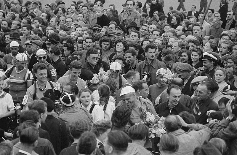 Original image description from the Deutsche FotothekRadrennfahrer beim Etappenstart auf dem Karl-Marx-Platz (heute: Augustusplatz) Die Fahrer der Friedensfahrt 1952 vor dem Start zur achten Etappe von Leipzig nach Chemnitz. In der Menge: Ian Steel (Nr. 5), Frank Seel (Nr. 2)